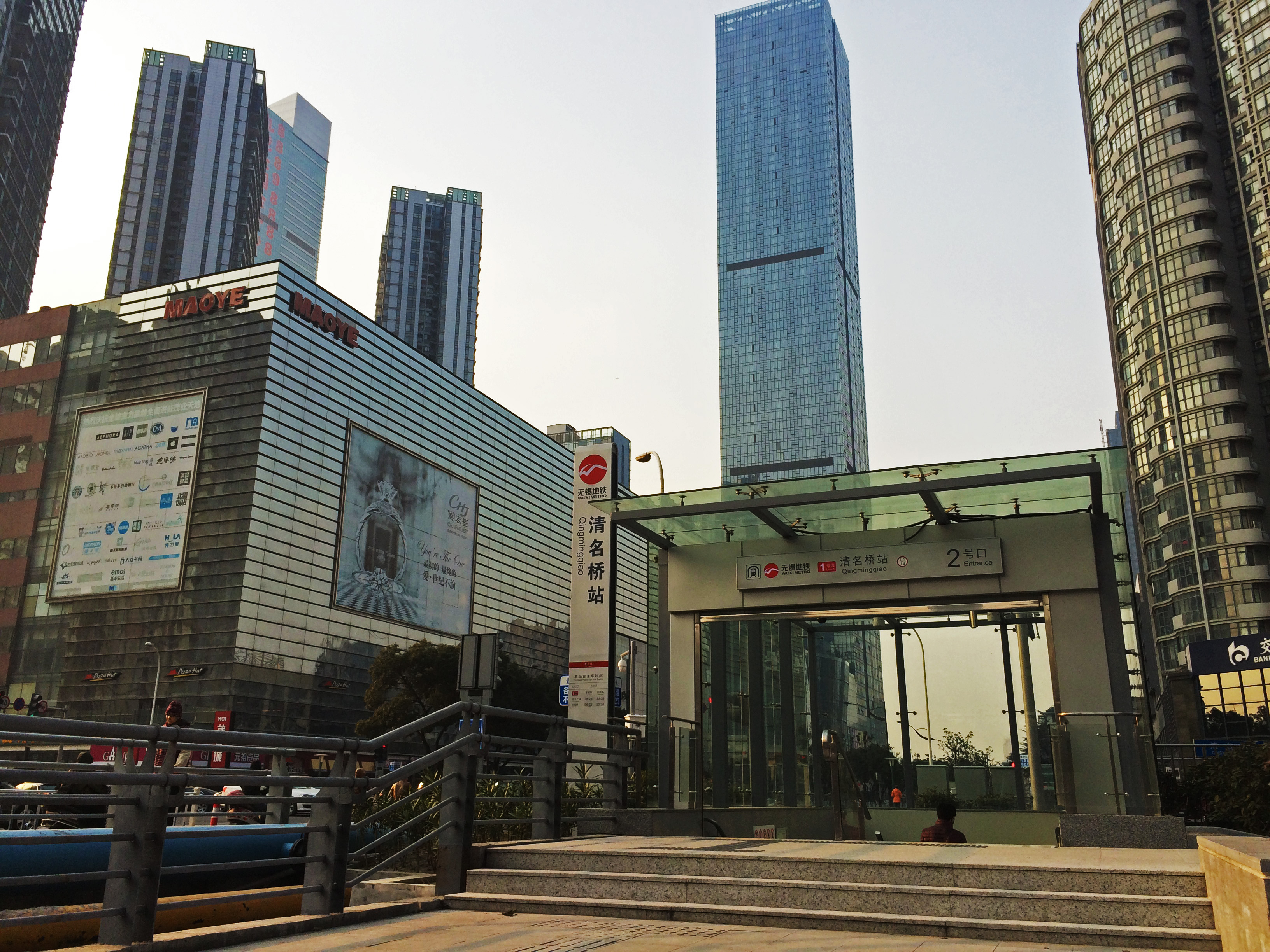 無錫地鐵清名橋站2號出入口